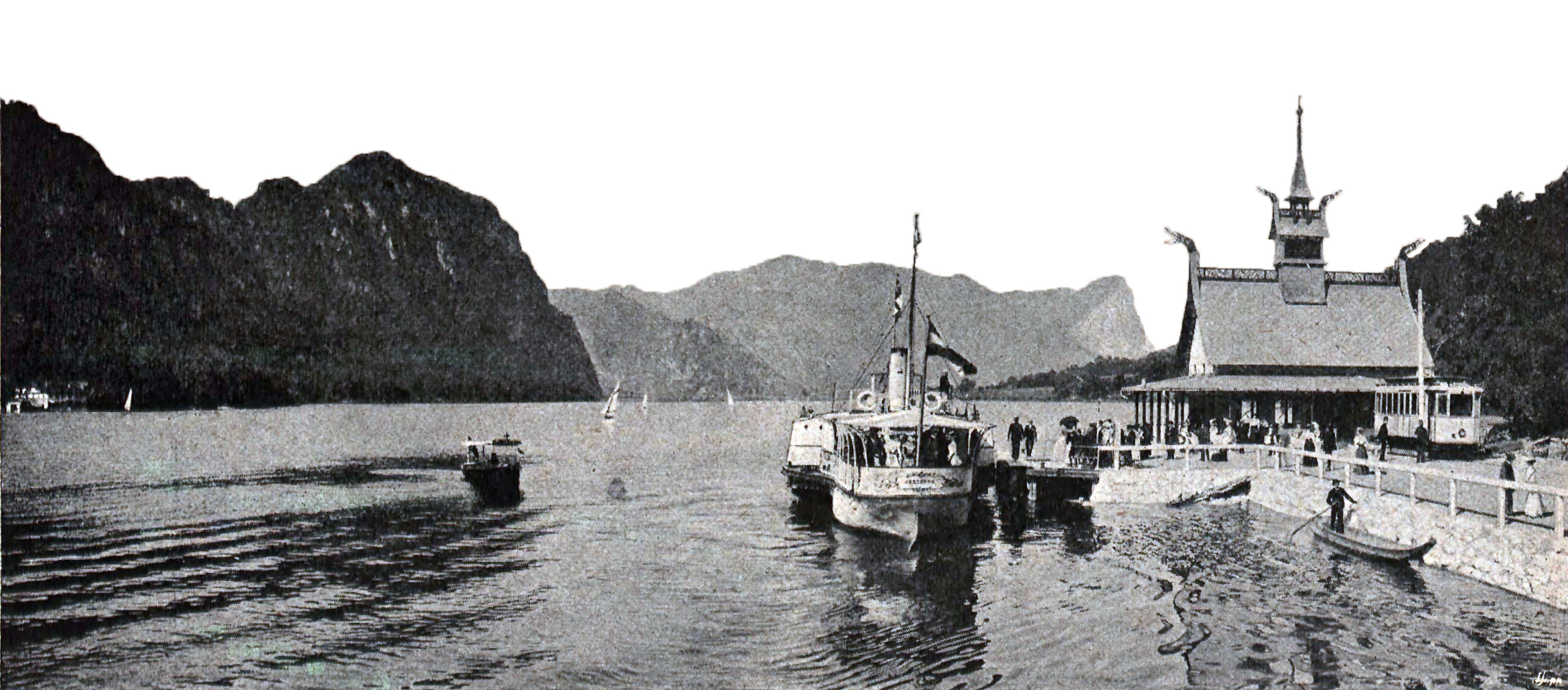 Straßenbahn Unterach—See (Ort See am Mondsee, Gemeinde Unterach am Attersee) mit norwegischem Stationspavillon; die Seefläche des Mondses gehört zur Gemeinde Mondsee.